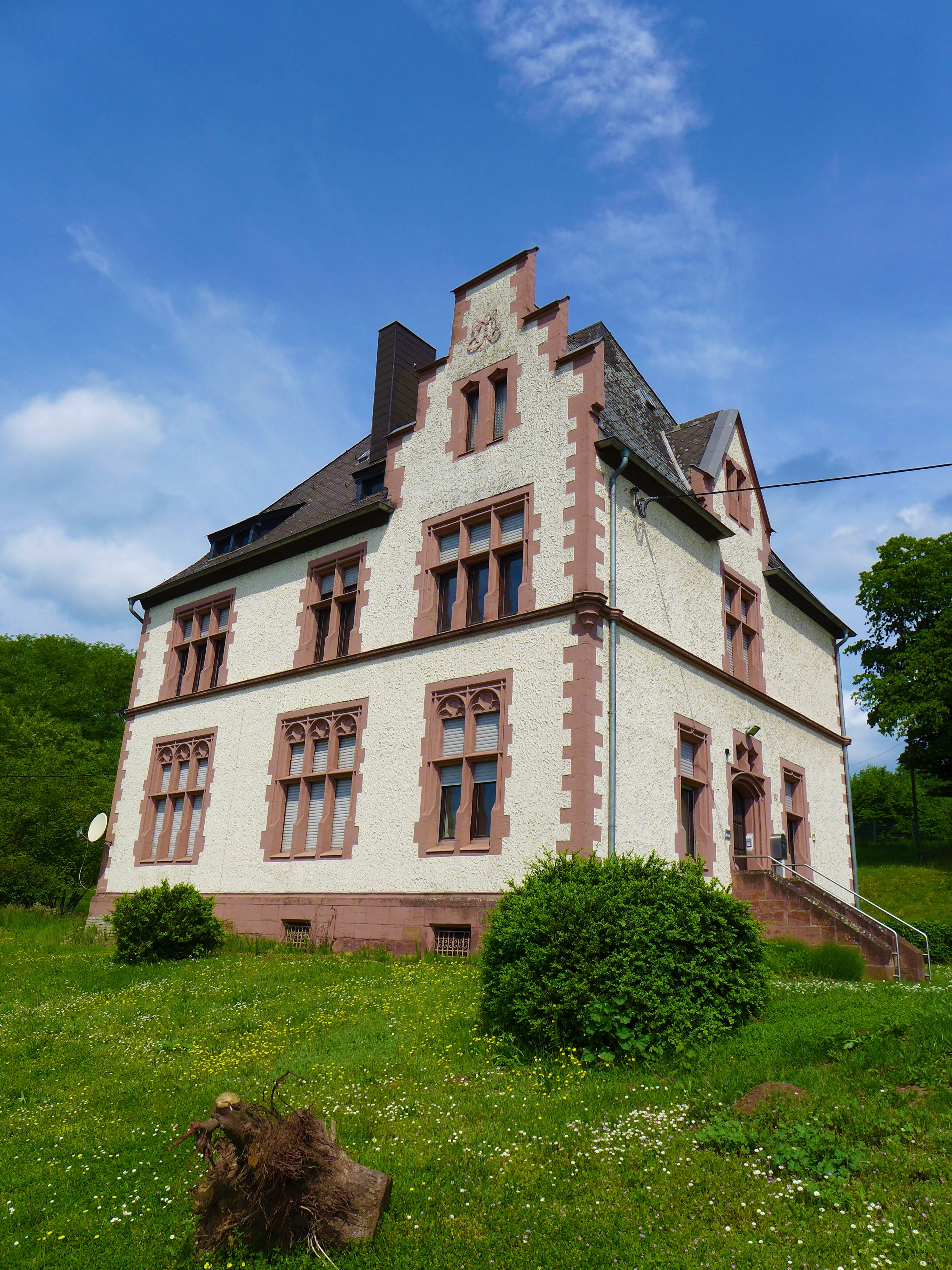 Diefflen, Pfarrhaus